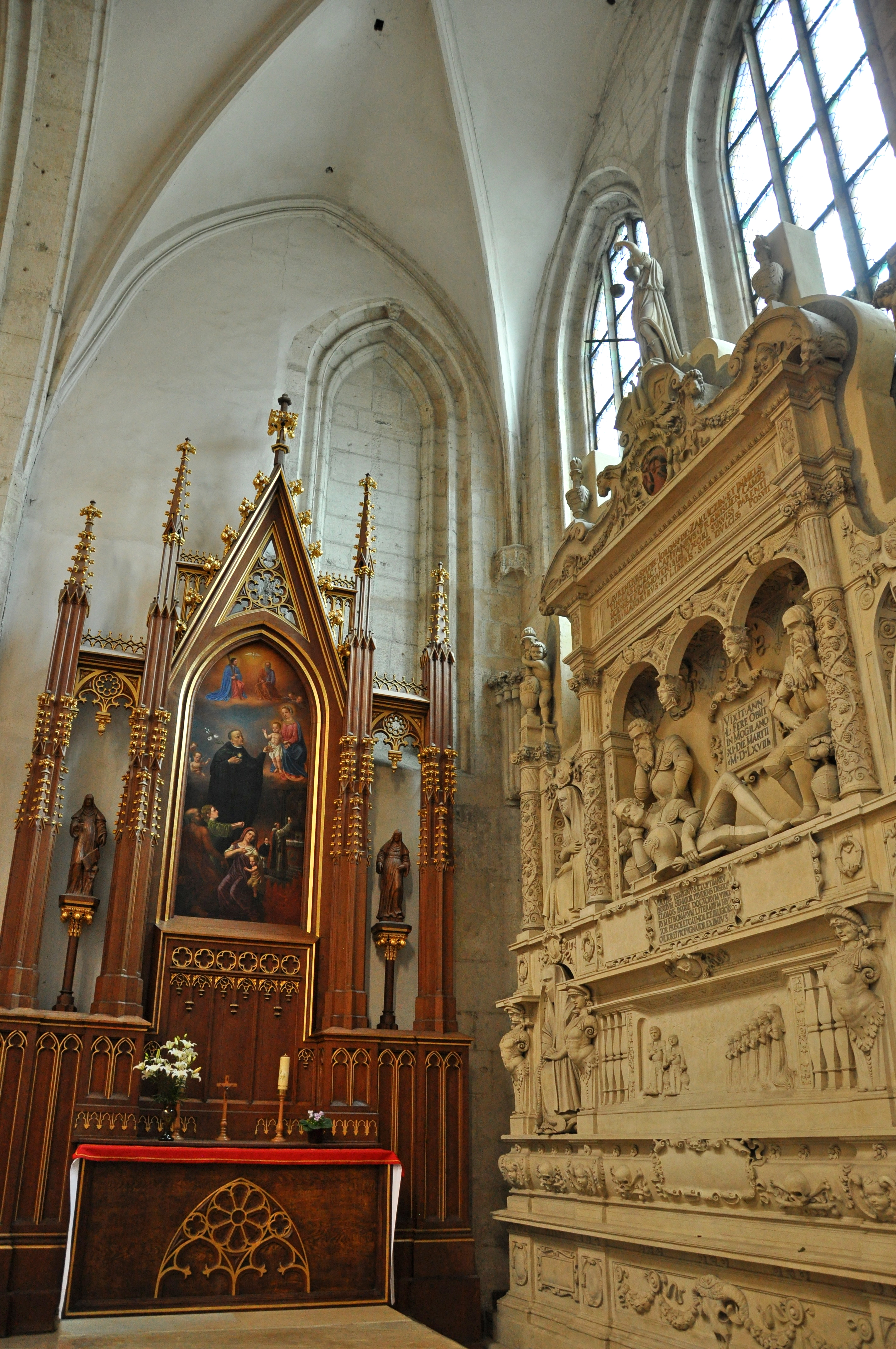 Kościół św. Katarzyny Aleksandryjskiej i św. Małgorzaty w Krakowie. Z prawej nagrobek Spytka Jordana